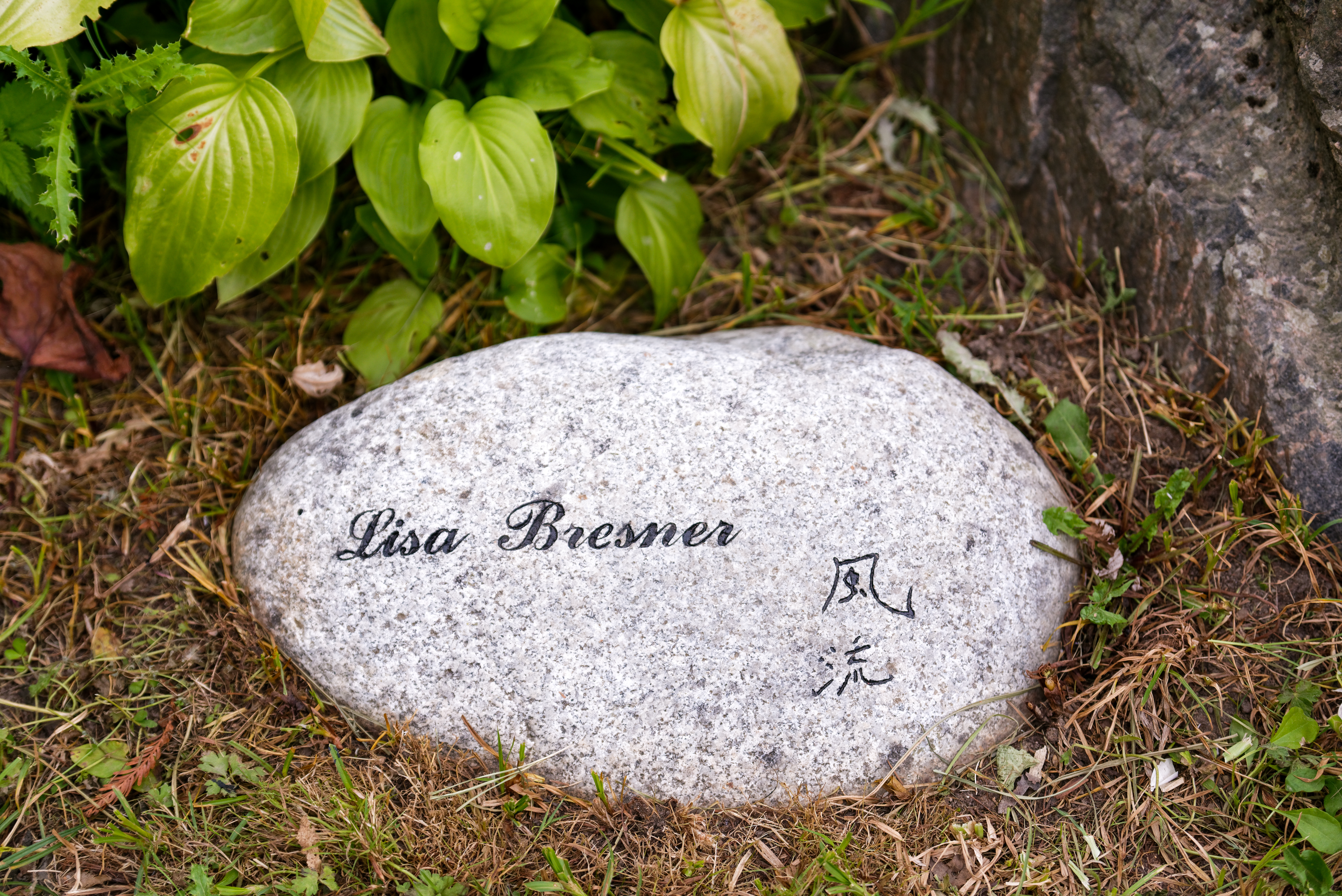 Pierre commémorative en hommage à Lisa Bresner dans le jardin japonais de l'île de Versailles. (Nantes, Loire-Atlantique, Pays de la Loire, France)